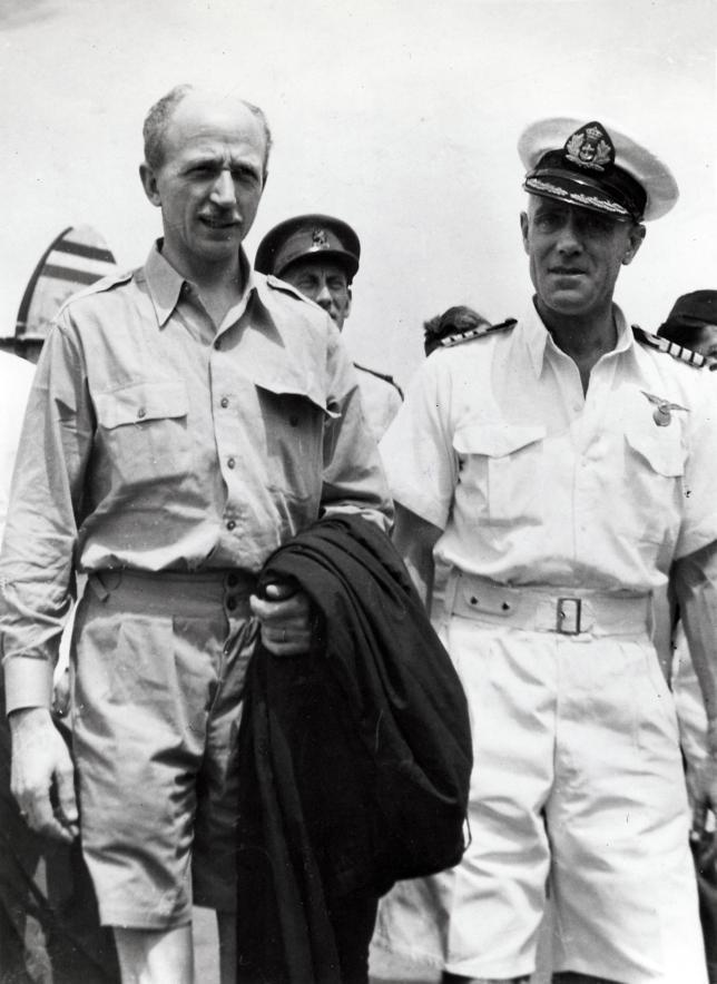 Schaper, H. (Partijloos). Aankomst van Schout bij Nacht H. Schaper (links), vlagofficier van de Marine Luchtvaartdienst, in Batavia (het tegenwoordige Jakarta) in Nederlands-Indië (Indonesië), voor het voeren van verschillende besprekingen. Hij wordt verwelkomd door commandant kapt. vlieger P. Vroon. Jakarta / Batavia, Indonesië / Nederlands Indië, 17 november 1949.